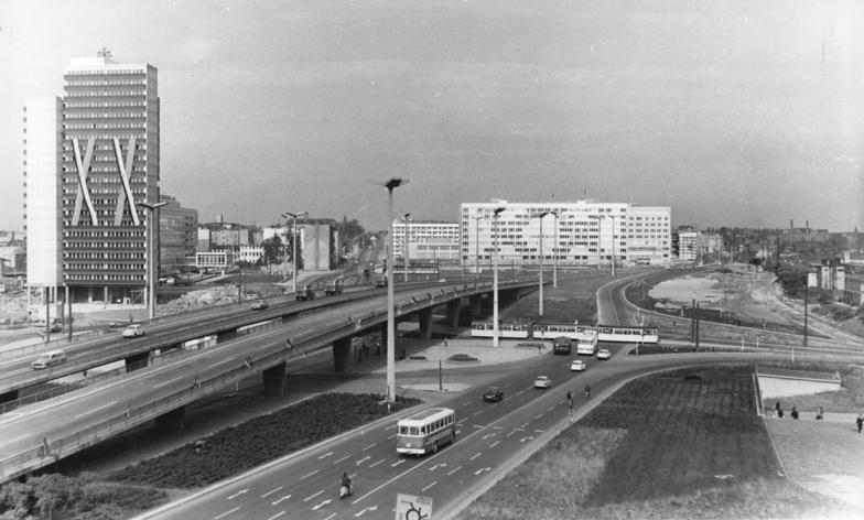 Halle, Hochstraße, Verwaltungsbauten Zentralbild Schaar 16.10.1969 Stadtansichten von Halle, im Mittelpunkt die neuerbaute Hochstraße und Verwaltungsneubauten. Gebäudeschmuck zum 20. Jahrestag der DDR.